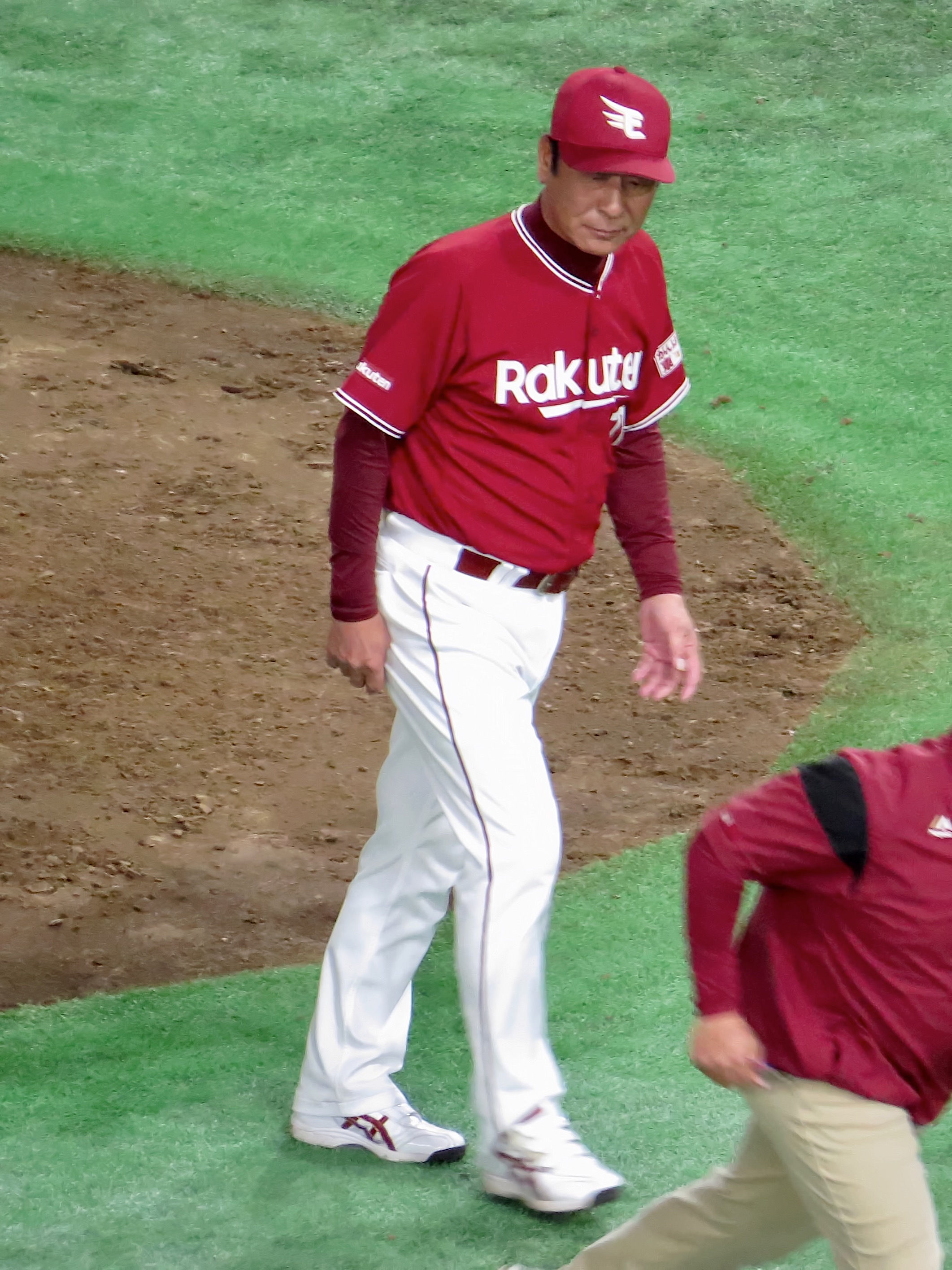 東北楽天ゴールデンイーグルスのコーチ。東京ドームにて。